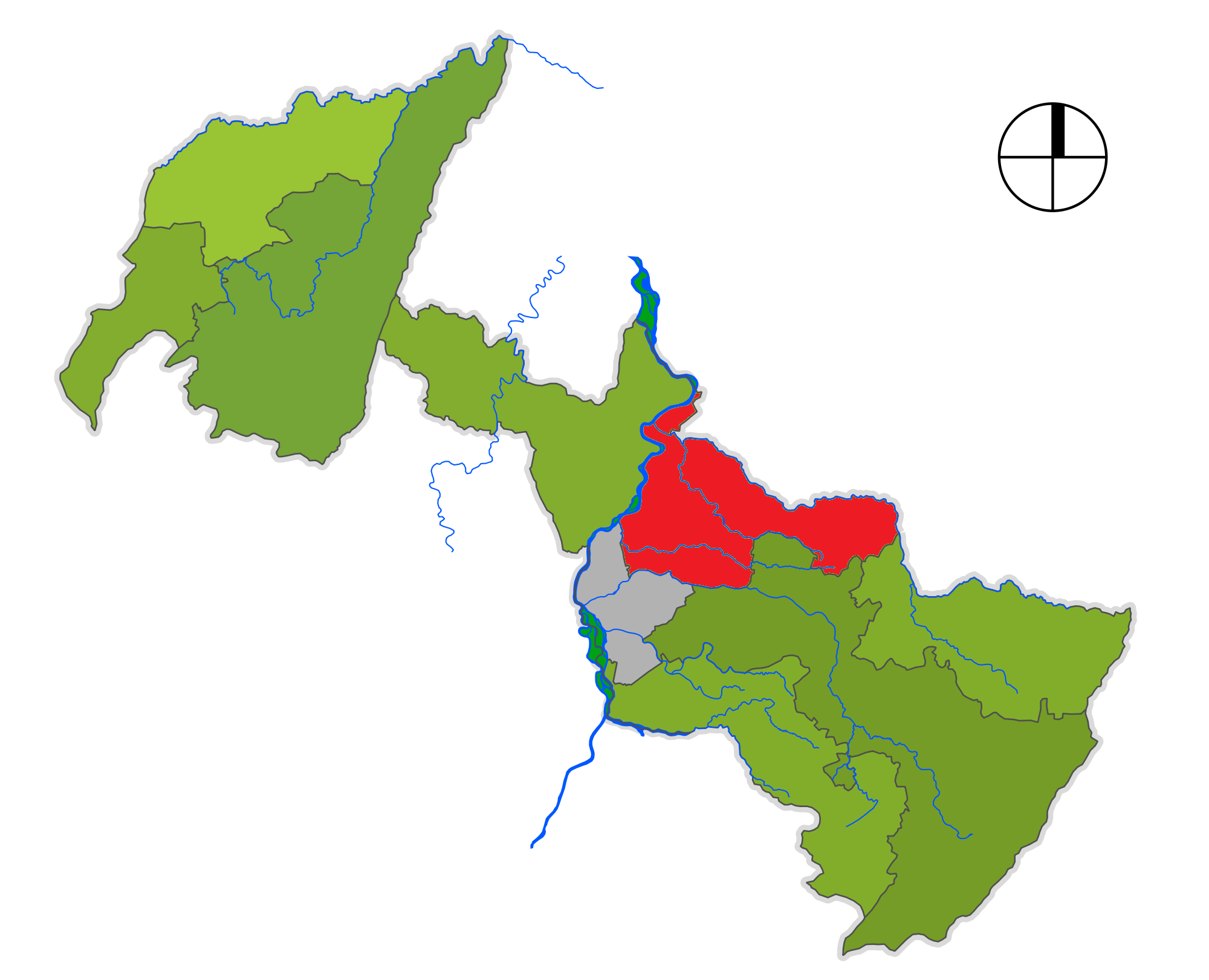 Corregimiento de Neiva Fortalecillas, departamento del Huila, Colombia.